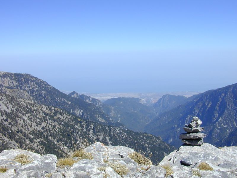 Aussicht vom Olymp richtung Osten. ca. 300 Meter unter dem Gipfel.